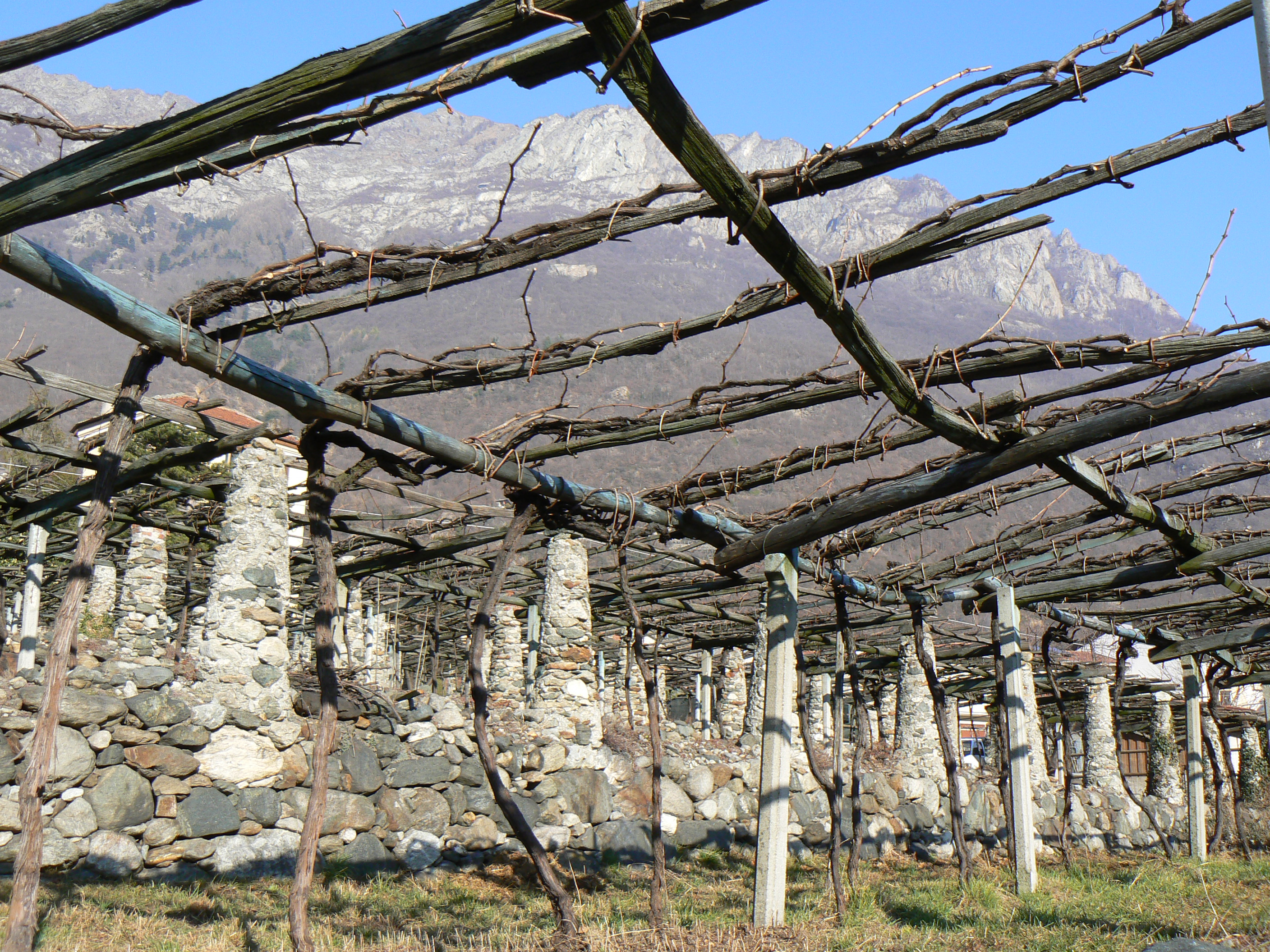 Dettaglio delle pergole in inverno. I secolari terrazzamenti della vite, Donnas, Valle d'Aosta, Italia. This is a photo of a monument which is part of cultural heritage of Italy.